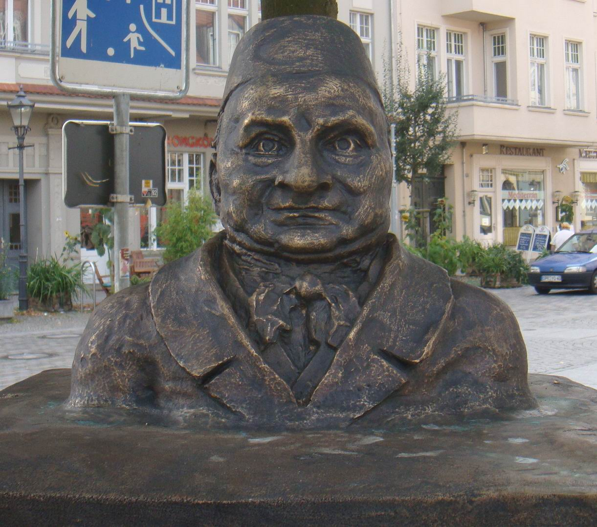 Büste Der Lithograph, nach einem Entwurf von Johanna Motschmann, Josefine Häßler und Philipp Untersteiner zu Ehren Gustav Kühns. Die Büste wurde gestiftet vom Rotary Club Neuruppin und auf dem Schulplatz in Neuruppin aufgestellt am 29.8.2008 zum 140. Todestags Kühns.